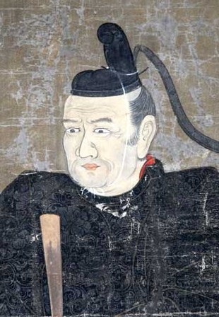 井伊直孝肖像、部分 Naotaka Ii